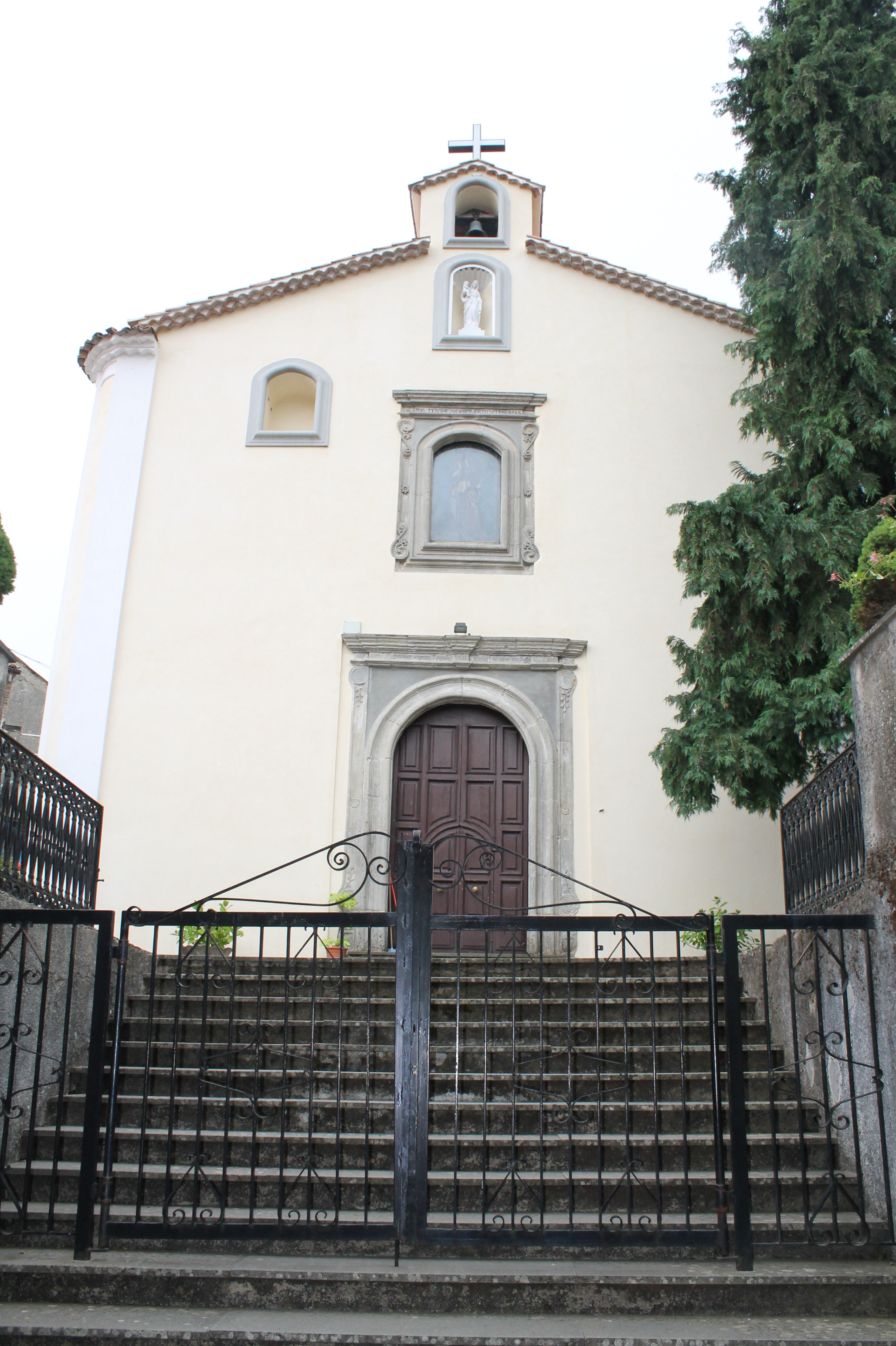 Chiesa del Borgo, dopo la ristrutturazione del 2012. San Martino di Finita (ITALIA)